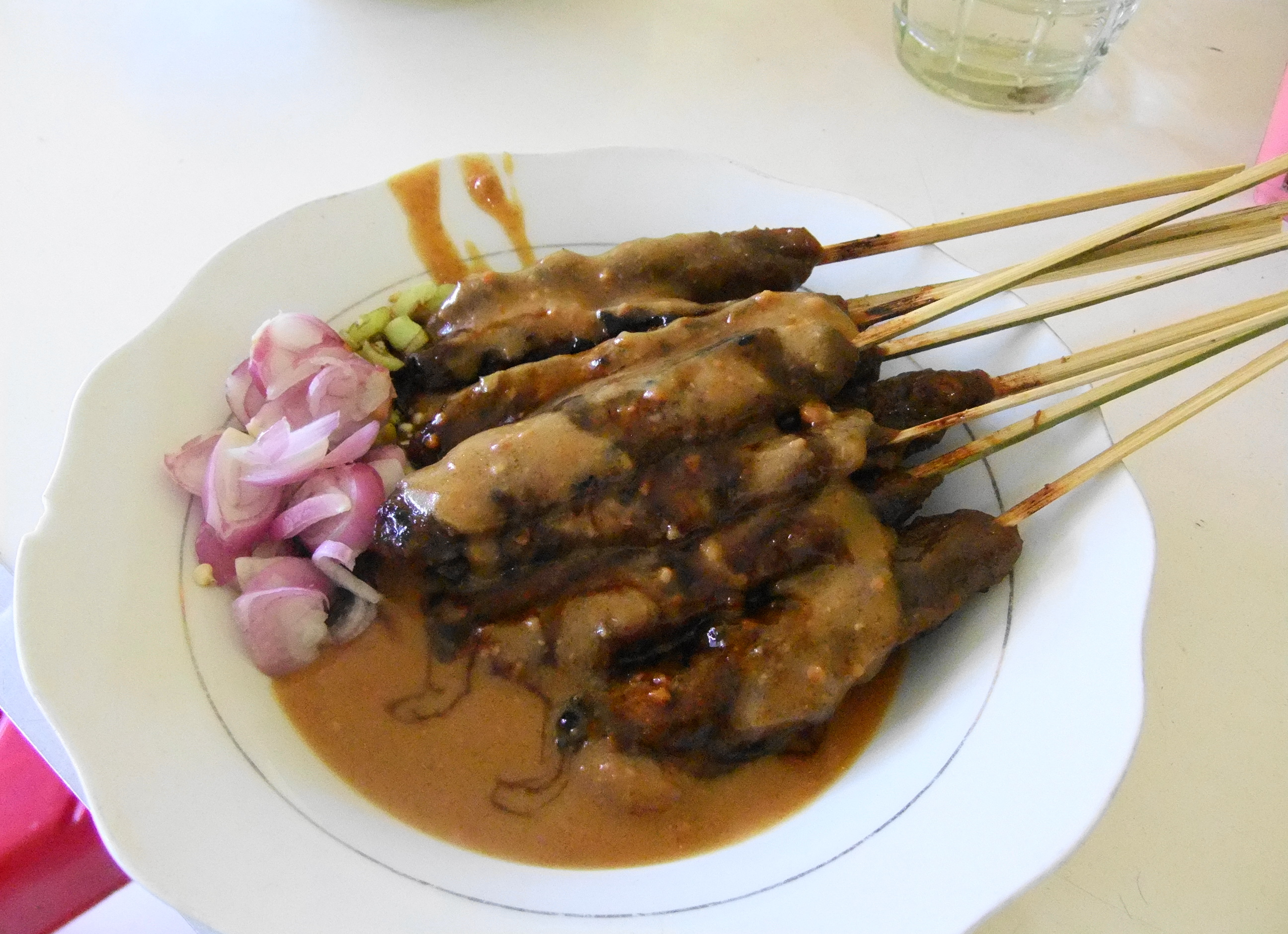 Sate sapi/kerbau Jepara